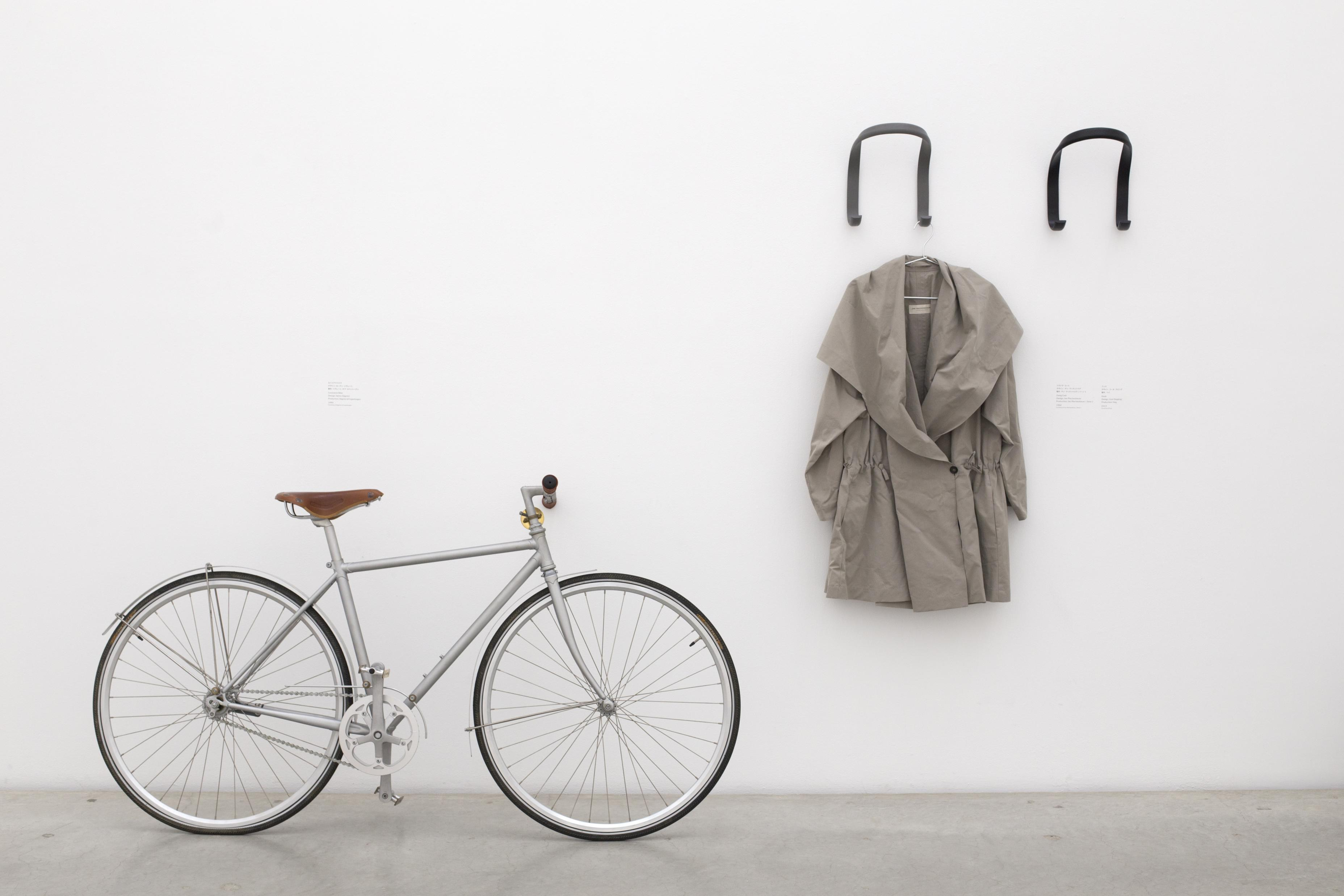 Sogreni Classic (Louisiana Bike) at Kanazawa 21st Century Museum of Contemporary Art